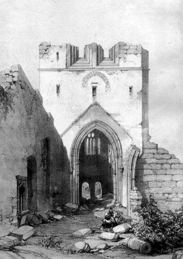 Voyages pittoresques et romantiques dans l'ancienne France. Tome Bretagne (1845)/ par MM. Ch. Nodier, J. Taylor et Alph. de Cailleux (livre publié pour la première fois en 1845). L'intérieur de l'église est en ruines et la Tour carrée découronnée